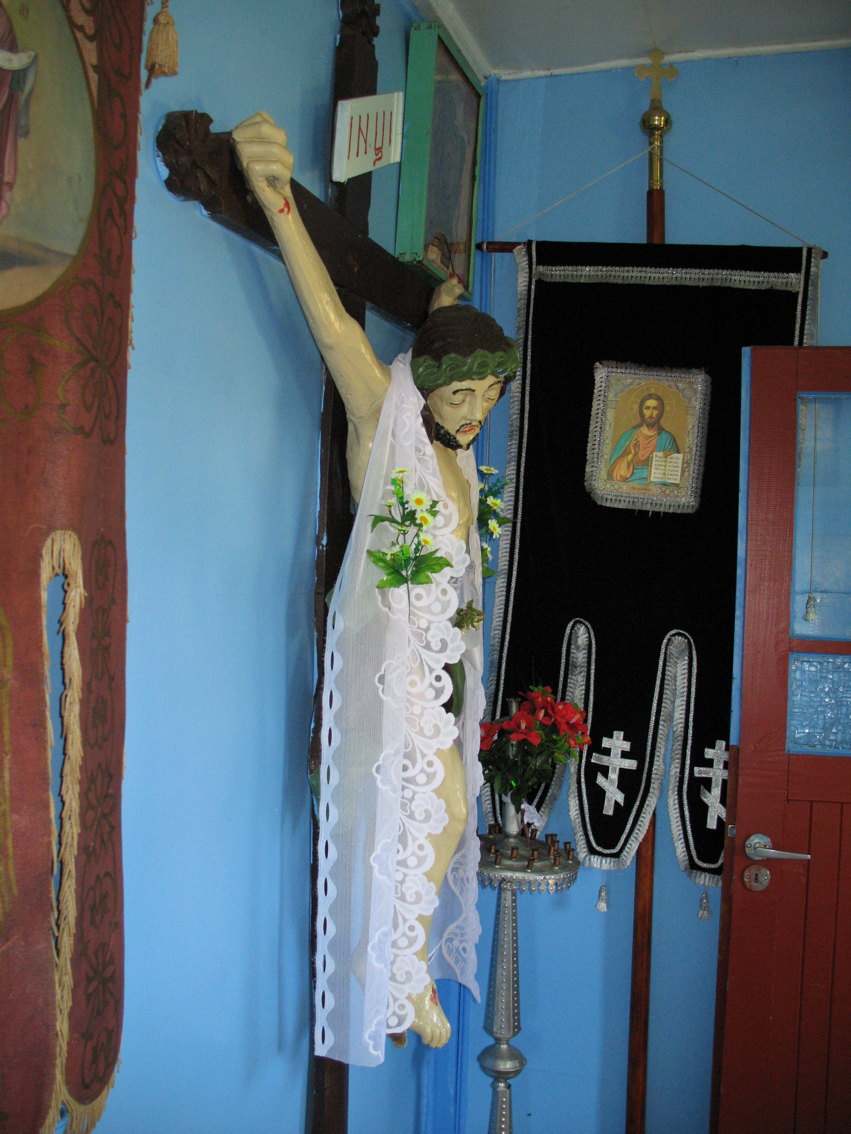 Krucyfiks, w miejscowej gwarze 'raspiatije' w kaplicy św. Proroka Eliasza w Socach.